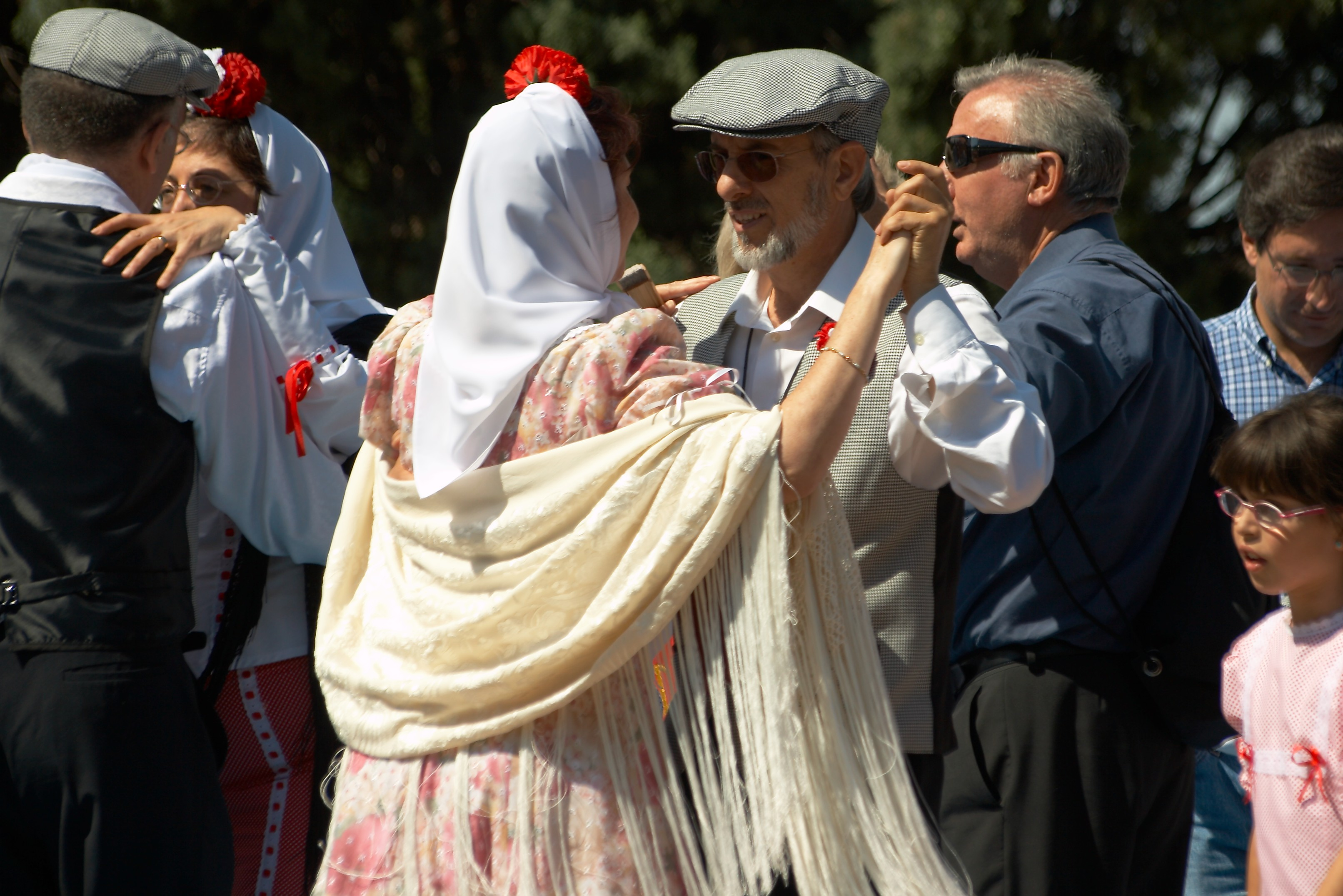 Chulapos. Fiestas de San Isidro 2007, Madrid, España.